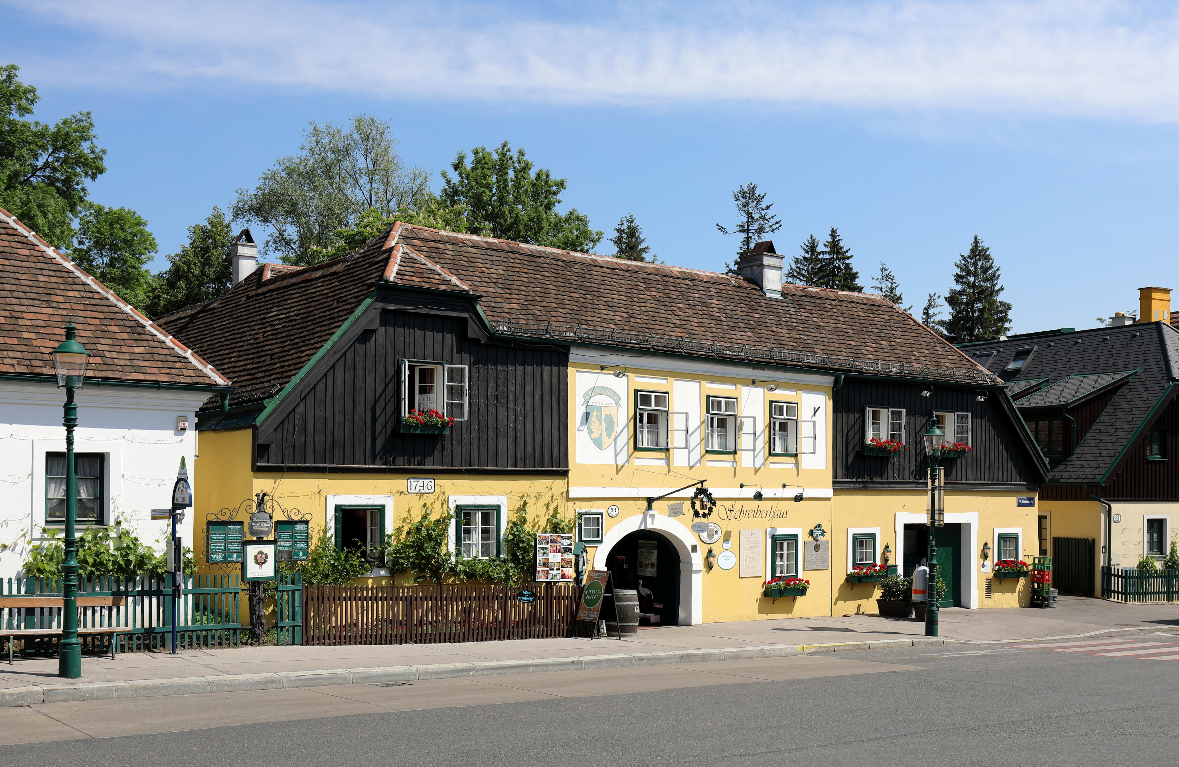 Das denkmalgeschützte Winzerhaus und Heuriger „Schreiberhaus“ in Neustift am Walde, ein Bezirksteil des 19. Wiener Gemeindebezirks Döbling.